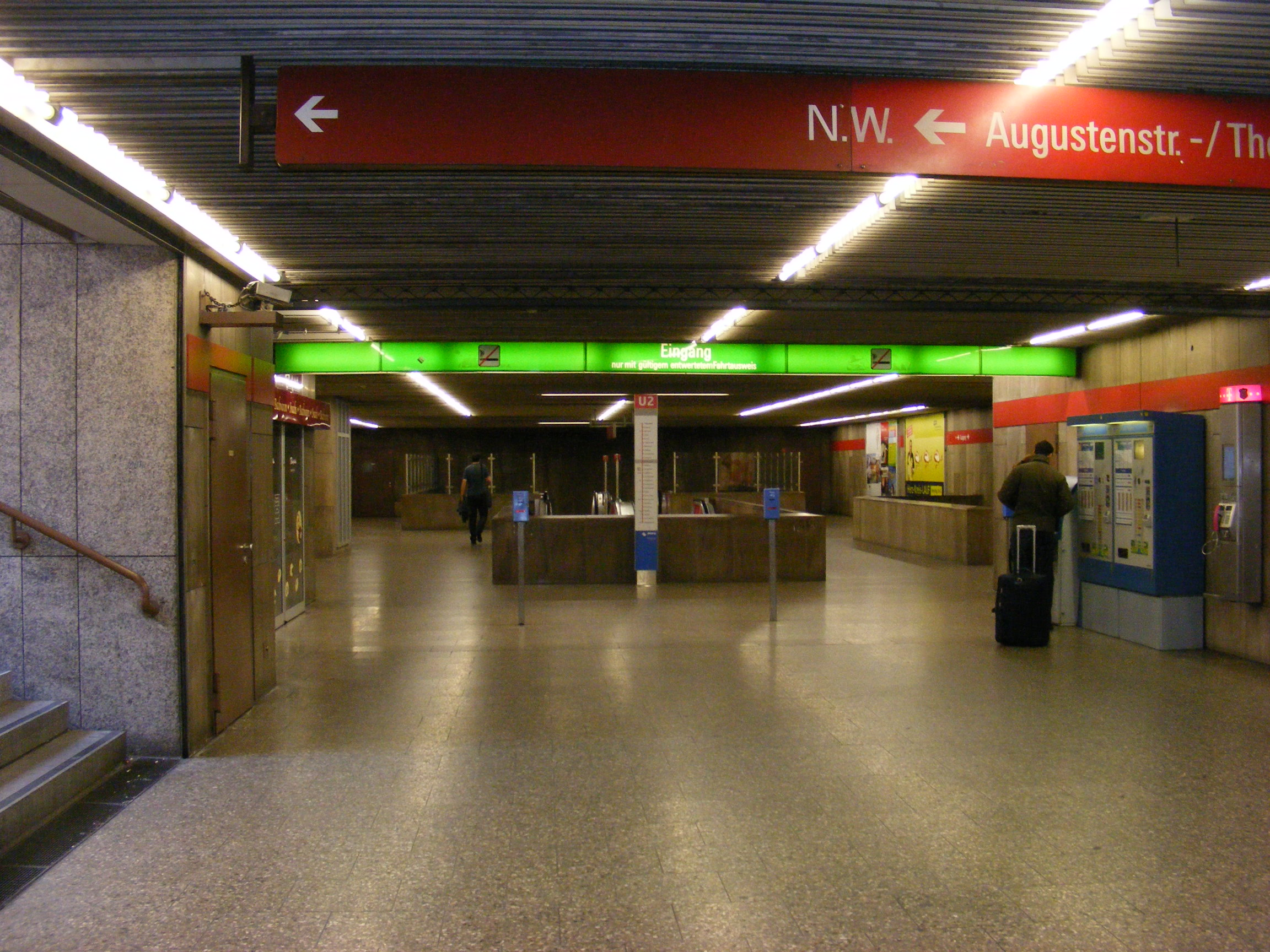 U-Bahn-Haltepunkt Theresienstraße, Zwischengeschoß (München).